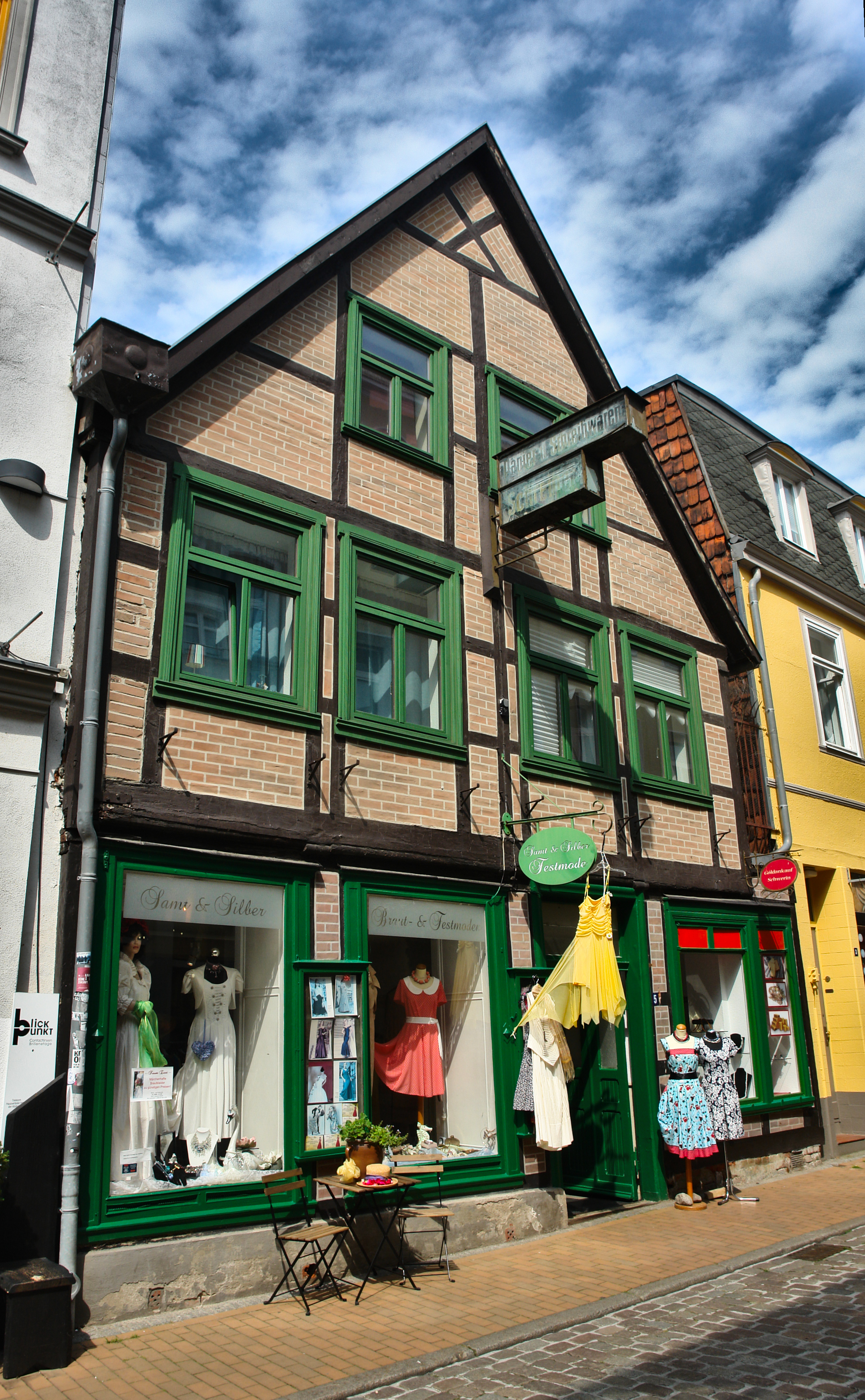 Buschstraße 5, 19053 Schwerin. Geschäft für Braut- und Festmoden